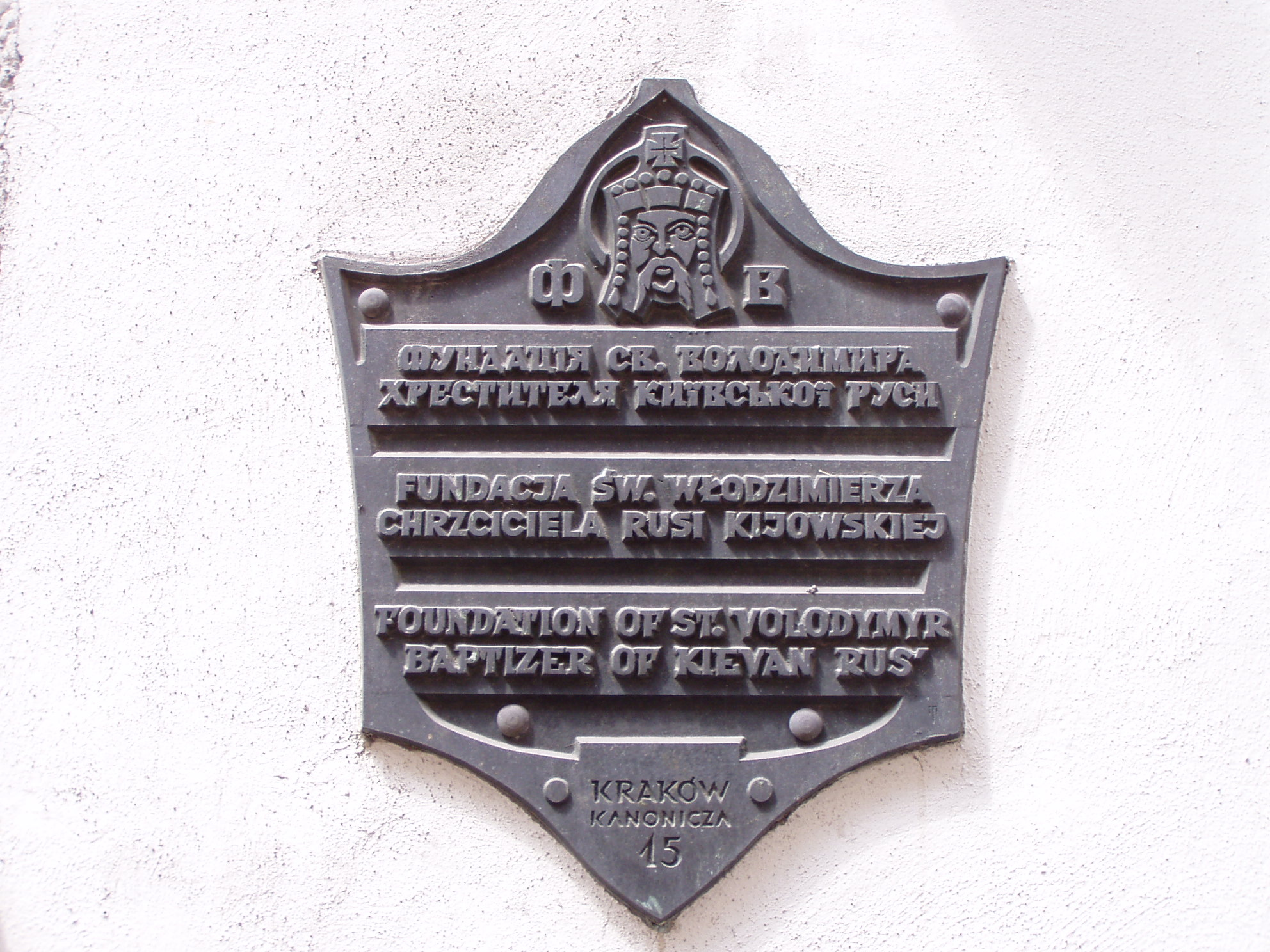 Tablica na budynku. Kraków, ul. Kanonicza 15.